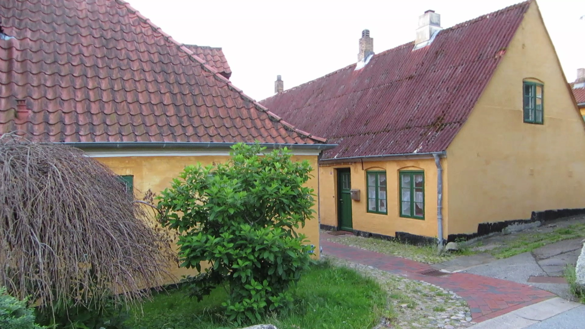 Die typisch gelben Häuser von Kupfermühle (2013), Bild 04